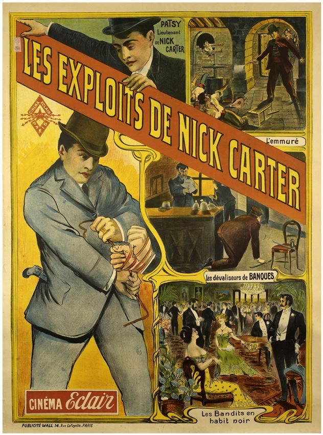 Affiche du film Les exploits de Nick Carter, cinéma l'Eclair.